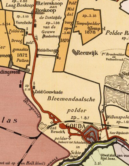 Bloemendaalse polder